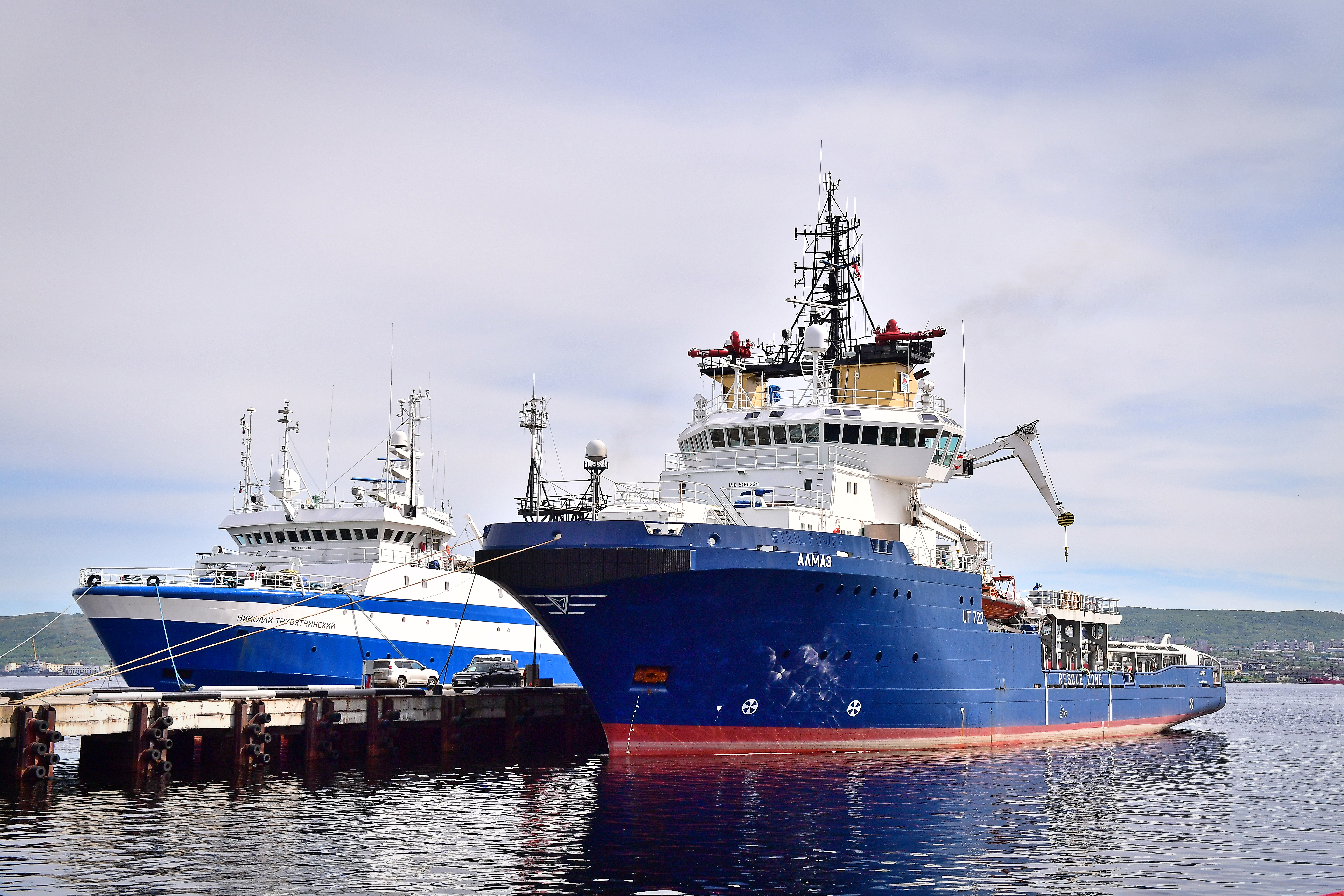 Тип судно обеспечения (ПБУ), буксир - якорезаводчик Порт приписки Большой порт С - Петербург Флаг Россия Класс КМ * Ice1 AUT1 FF2WS DYNPOS-2 Supply vessel Tug Oil Recovery Ship Классификационный регистрационный номер 960847